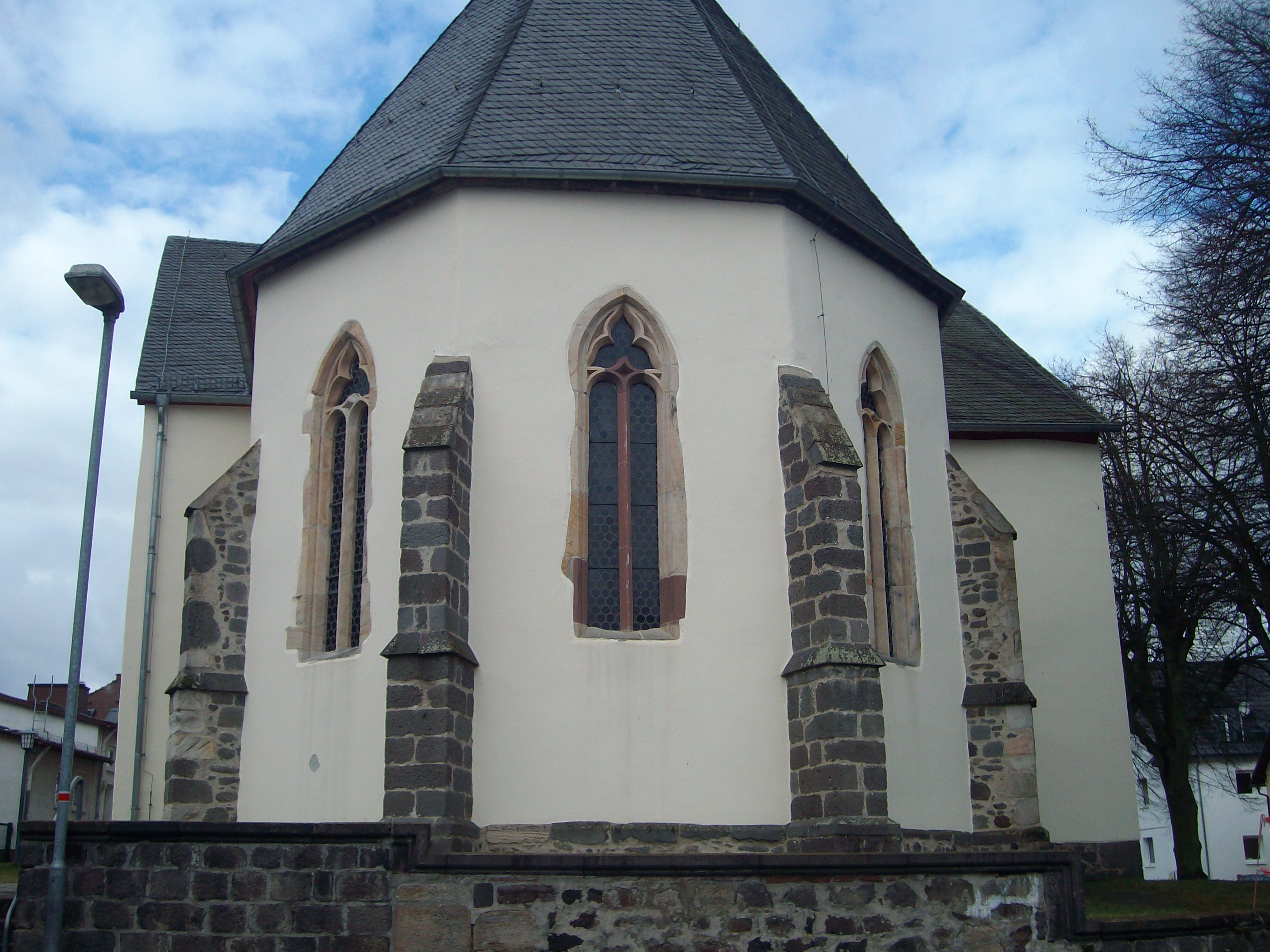 Evangelische Kirche Großen-Buseck, Hessen, Deutschland